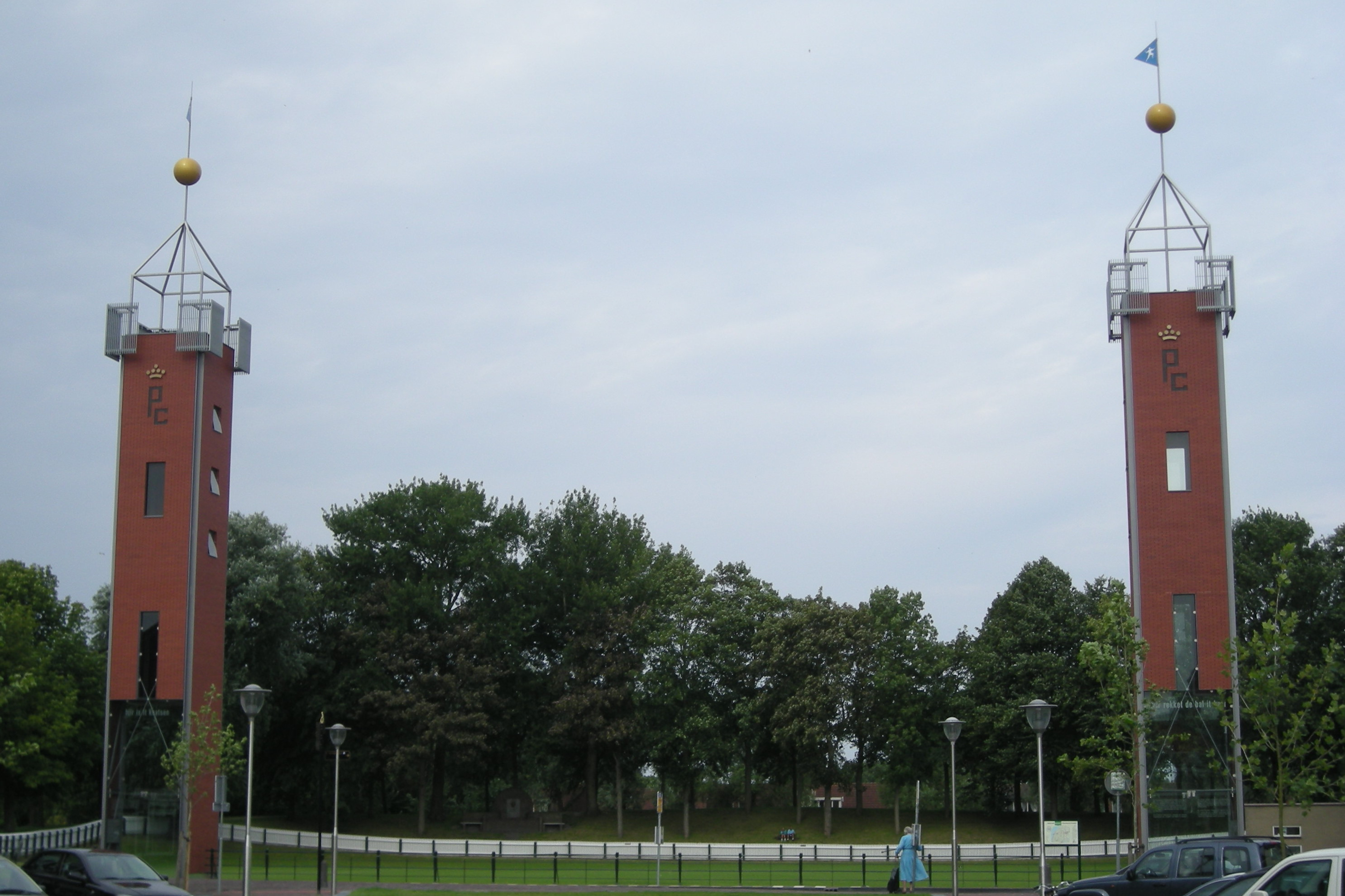 PC Kaatsen in Franeker